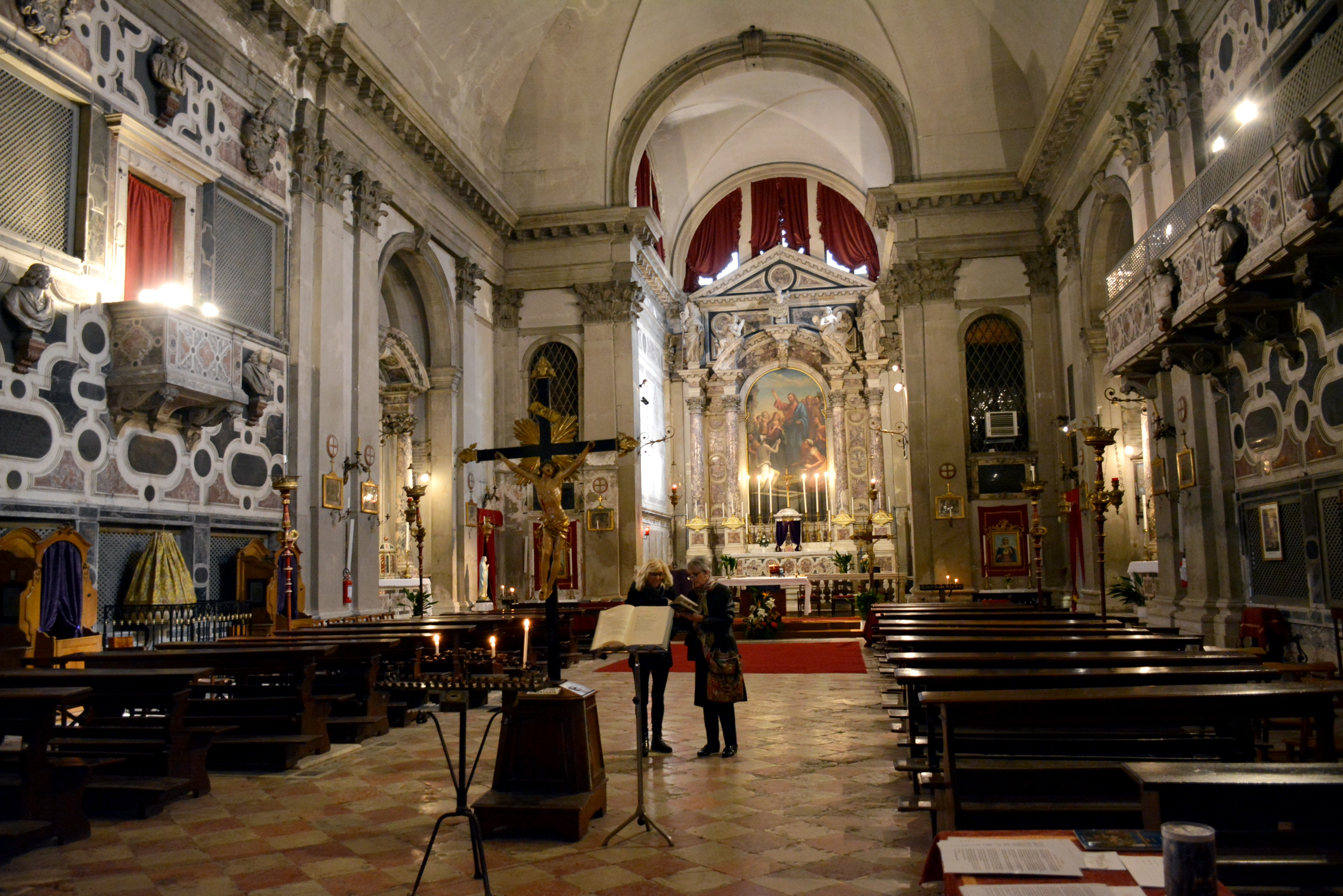 Chiesa di San Lazzaro dei Mendicanti INDIRIZZO: Fondamenta dei Mendicanti - Castello La chiesa, ora parte dell’Ospedale di Venezia, era la cappella dell’ospizio dei Mendicanti una delle più importanti realtà assistenziali di Venezia. Il complesso venne realizzato da Vincenzo Scamozzi (1601-1631) che collocò la chiesa con la semplice facciata palladiana tra le due ali degli edifici destinati a ricovero. All’interno si conserva Sant’Elena con la croce, unica opera lasciata a Venezia dal celebre pittore bolognese Guercino